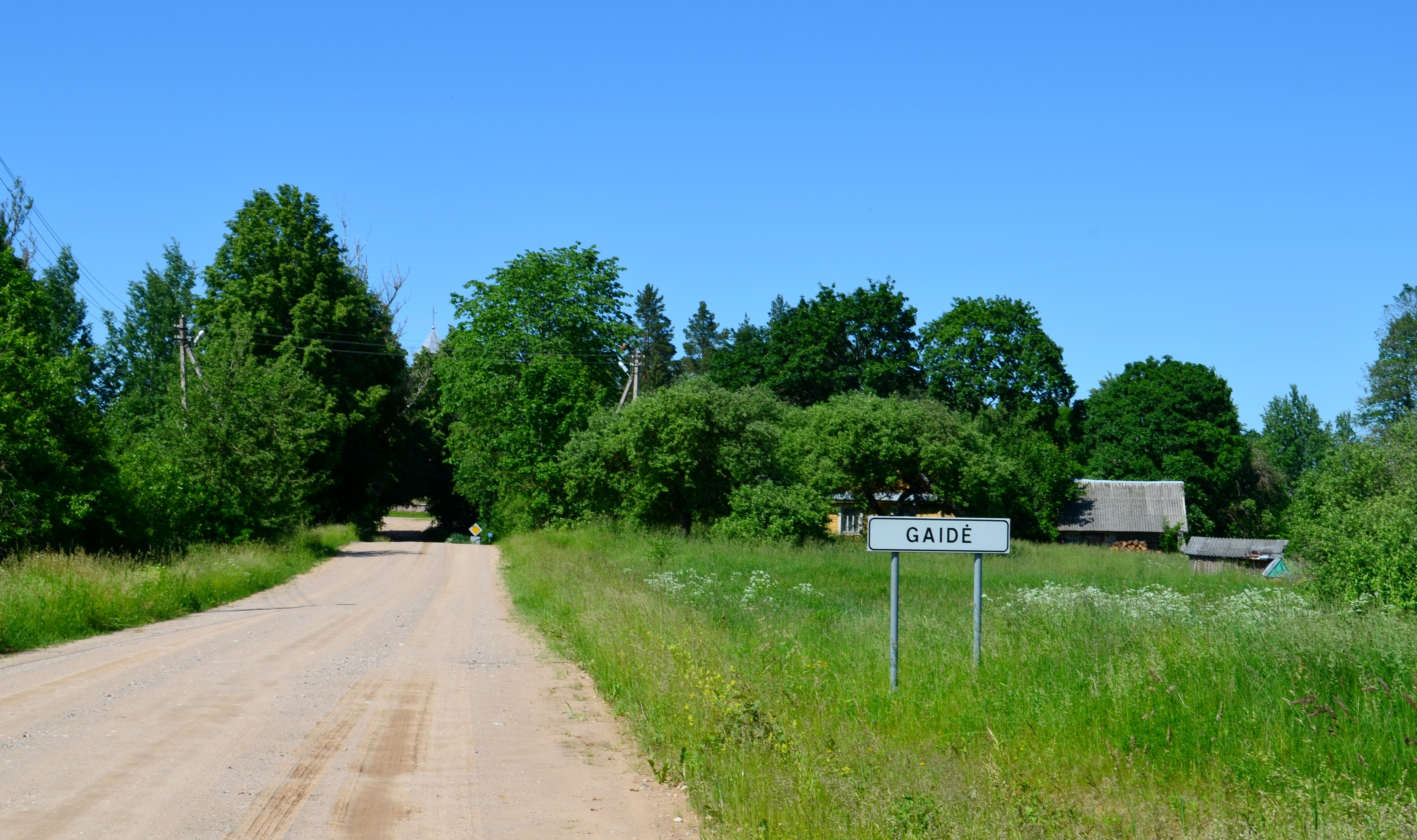 Gaidė, Ignalinos r.